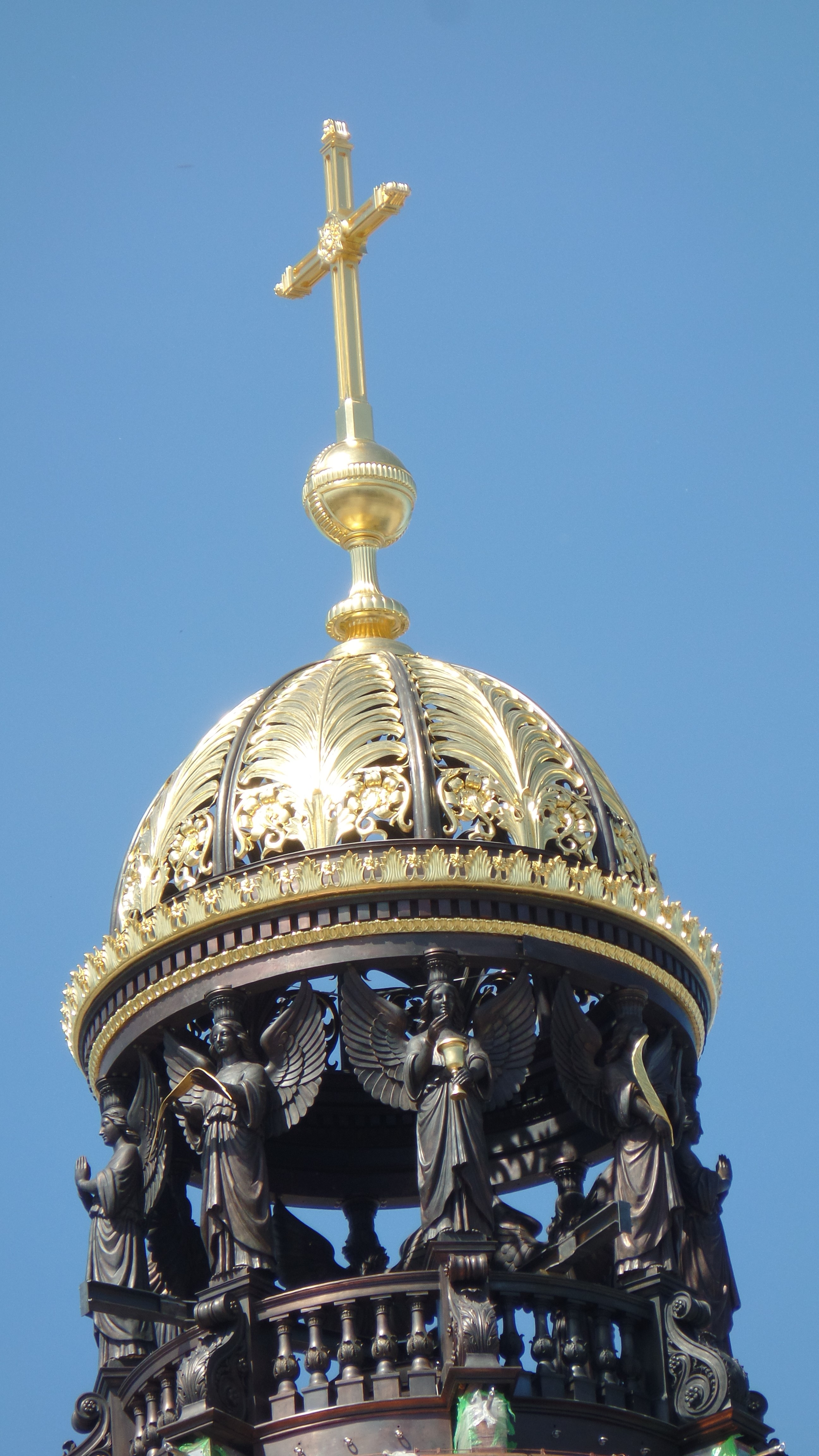 Kuppelkrone des Berliner Schlossneubaus